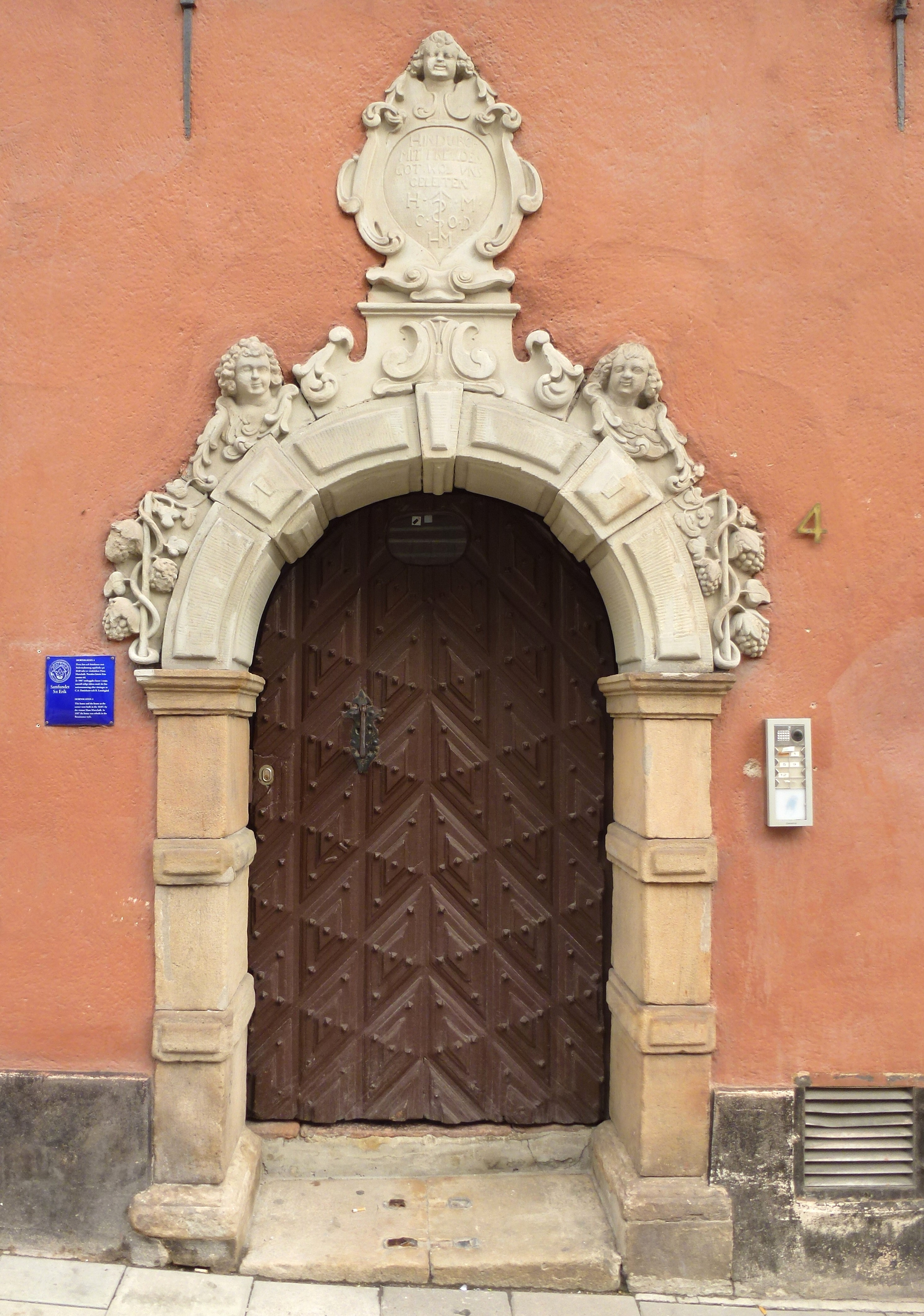 Hans Marschalcks hus entre från Hornsgatan 4